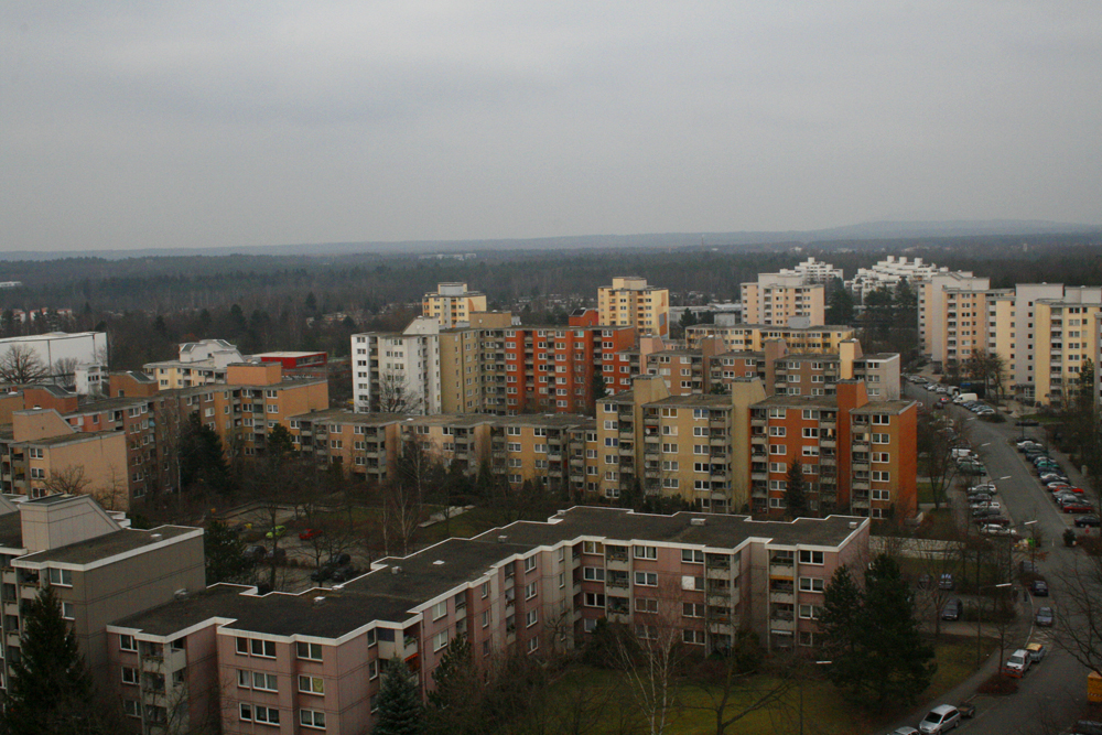 Teil der Plattenbausiedlungen am südlichen Ende von Langwasser (Nürnberg) aus den frühen 70er Jahren des 20.Jhr.